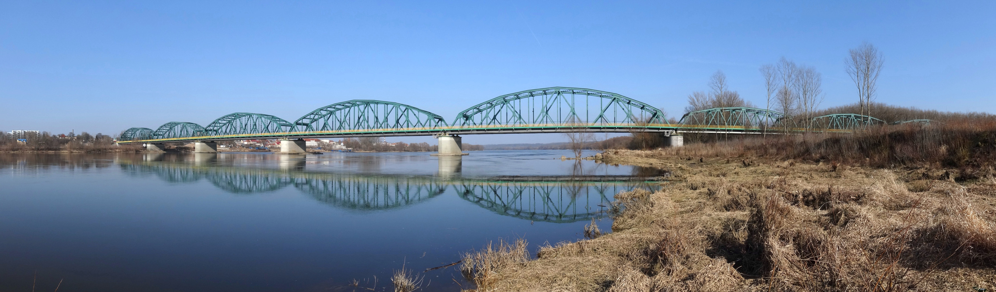 Most Fordoński im. Rudolfa Modrzejewskiego w Bydgoszczy